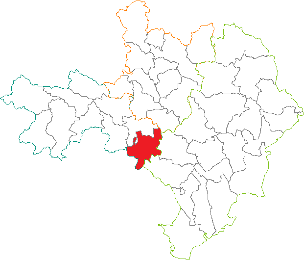 Situation du canton dans le département du Gard (France)